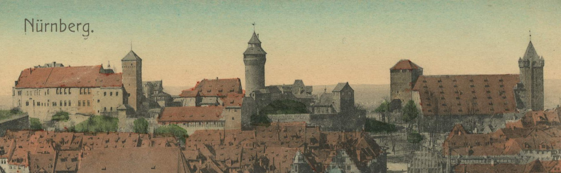 Nürnberger Burg, Ausschnitt einer Postkarte